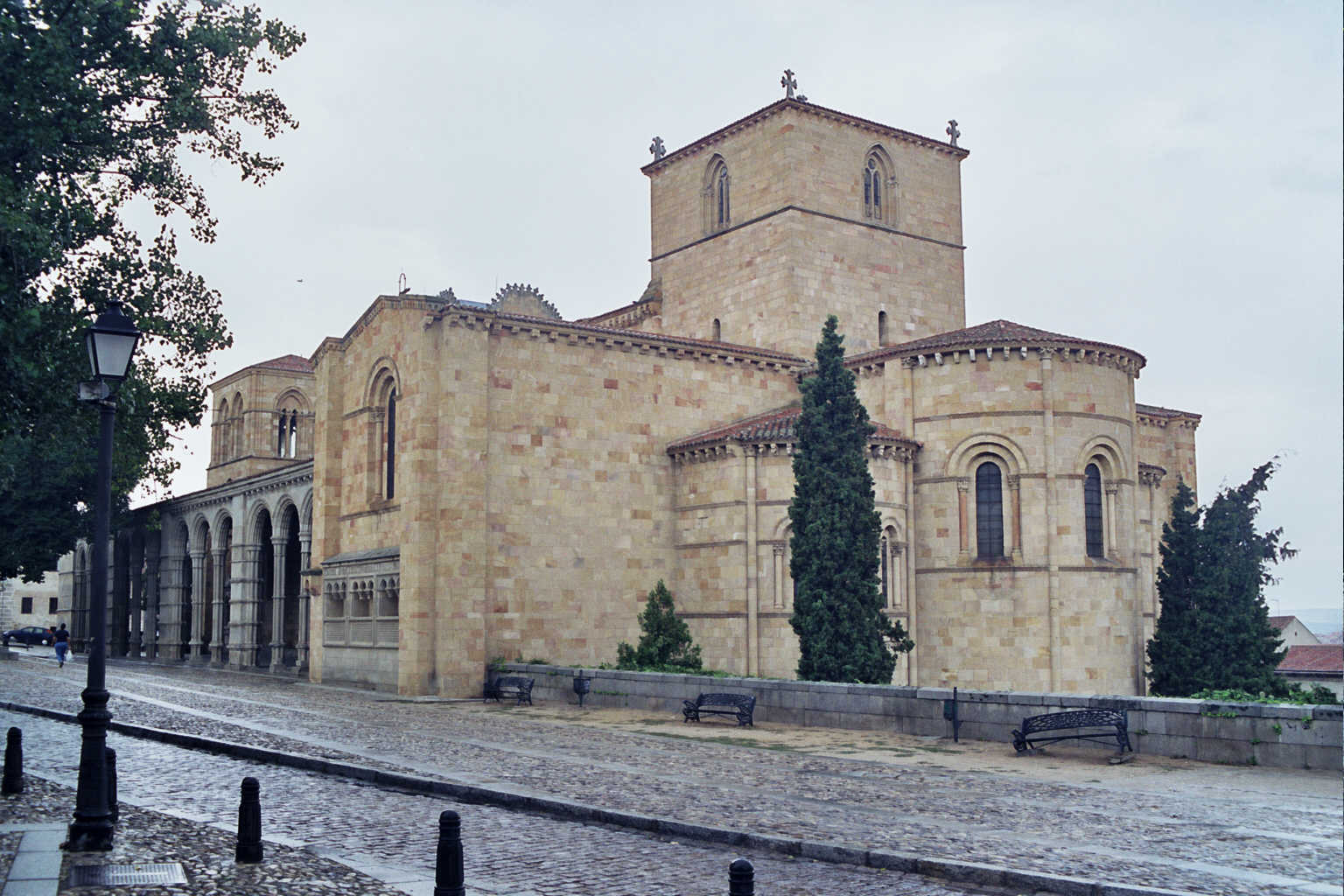 Ávila. (Castilla-León. España) Iglesia de San Vicente. Fotografía realizada el 24 agosto de 2002 por el autor.User:Pelayo2